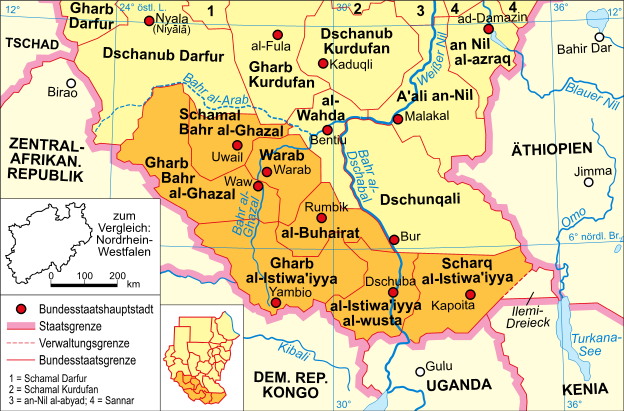 politische Karte des Sudan (Region Äquatoria)